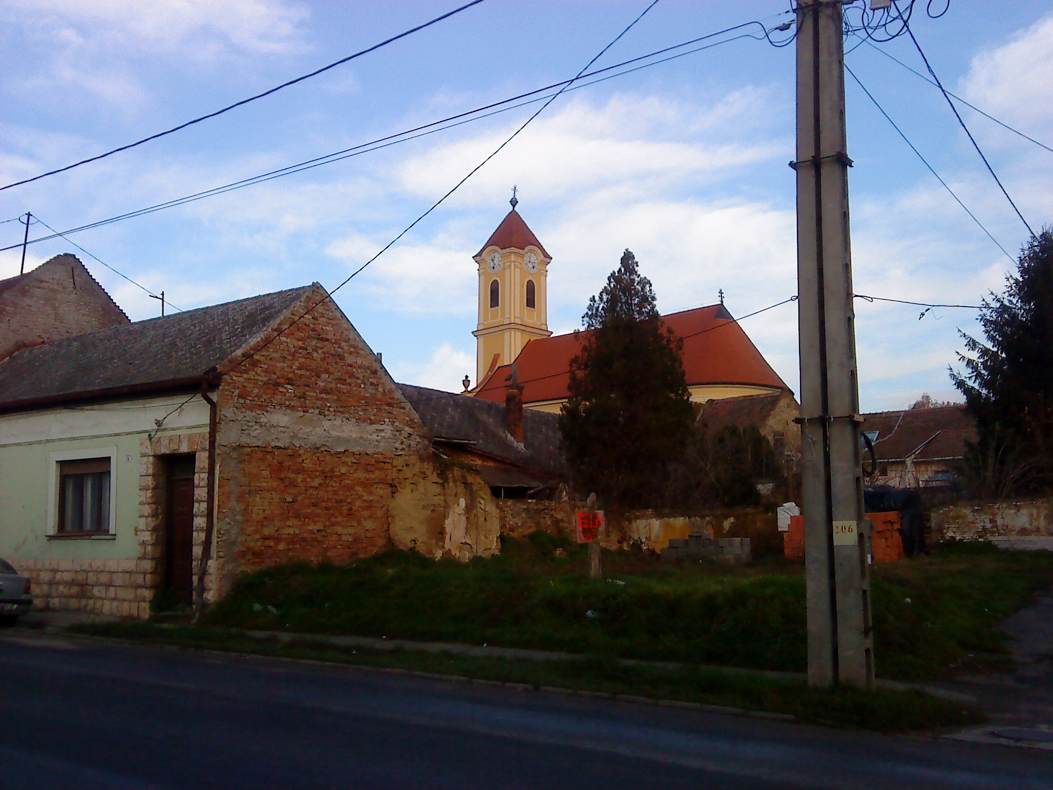 Siklósi szerb ortodox templom, amelyet 1783-ban kezdtek építeni, és közel 20 éven át építették This is a photo of a monument in Hungary, Identifier: 1916